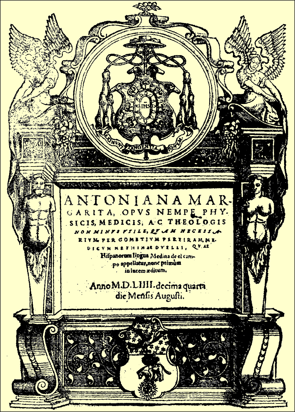 Antoniana Margarita: portada de la primera edición del libro hecho en Medina del Campo en el año 1554.El autor es el humanista, médico y filósofo español Gómez Pereira